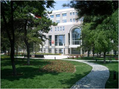 Главное здание КАСМО